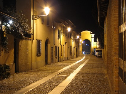 Arco di ingresso al paese di San Colombano al Lambro (MI)